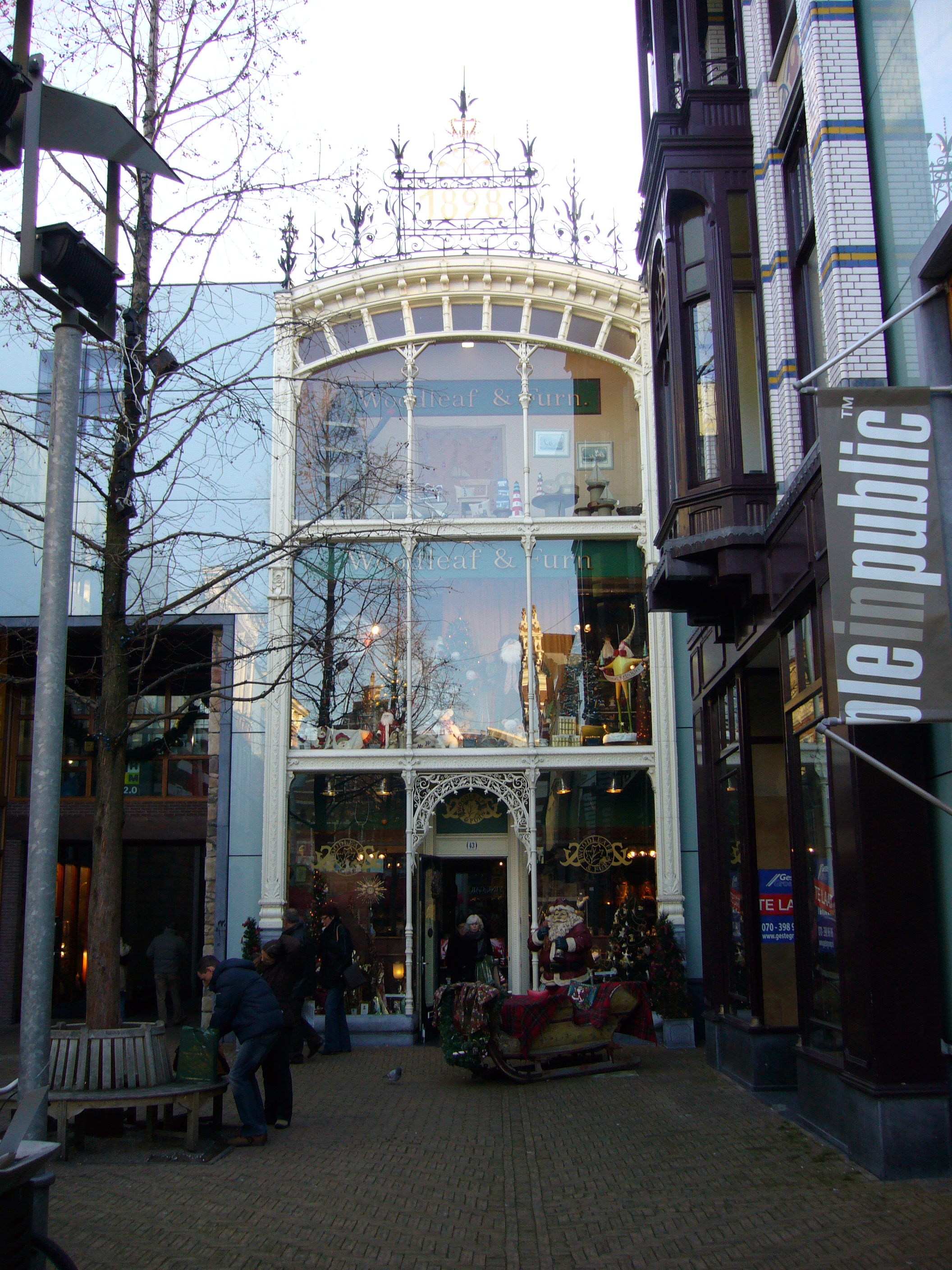 Den Haag, Haagse Bluf, gevel 1898